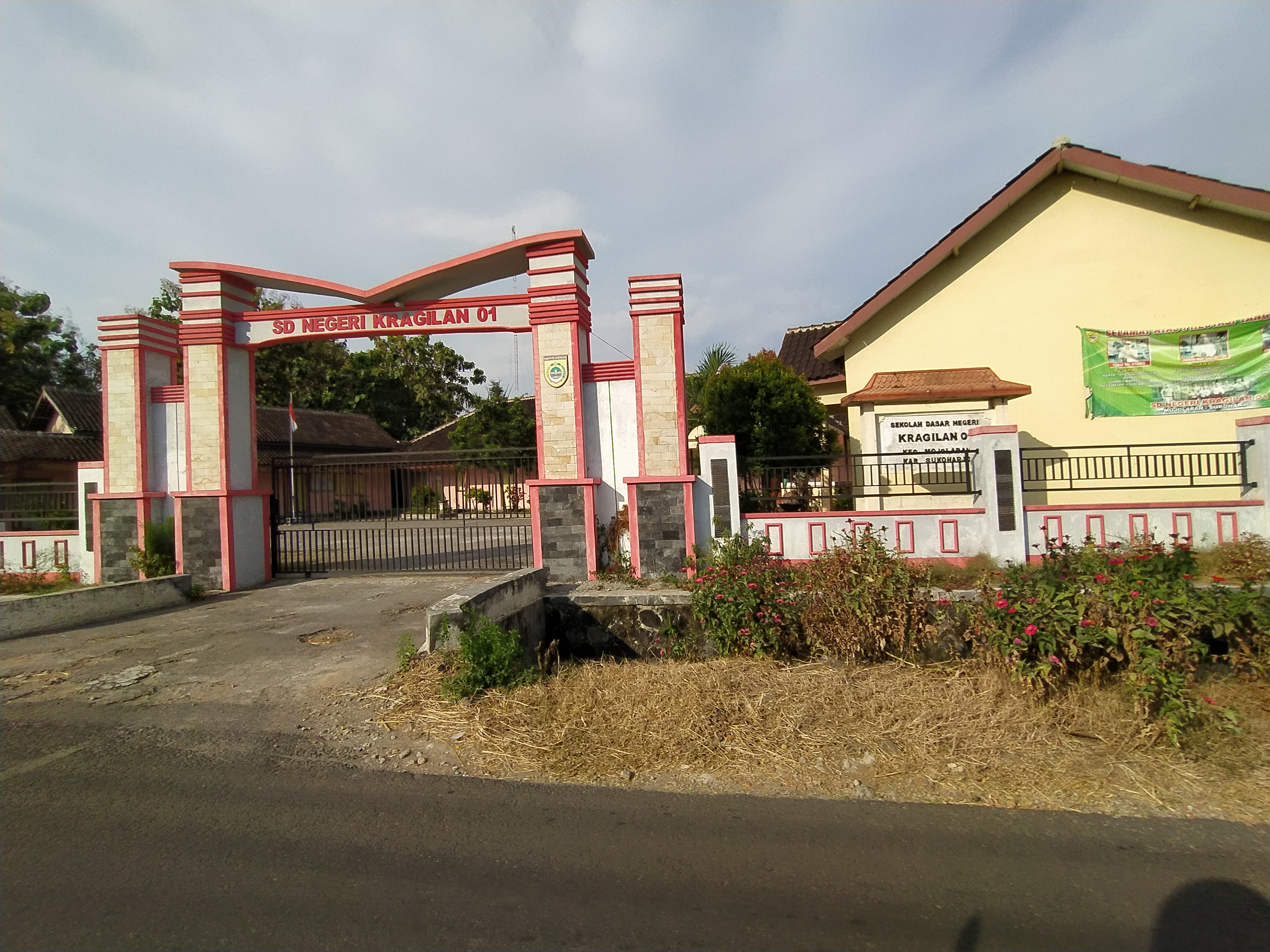 Jawa: Sekolah dasar negeri Kragilan 1 berada di kecamatan Mojolaban kabupaten Sukoharjo provinsi Jawa Tengah